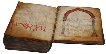 მცხეთის დავითნი